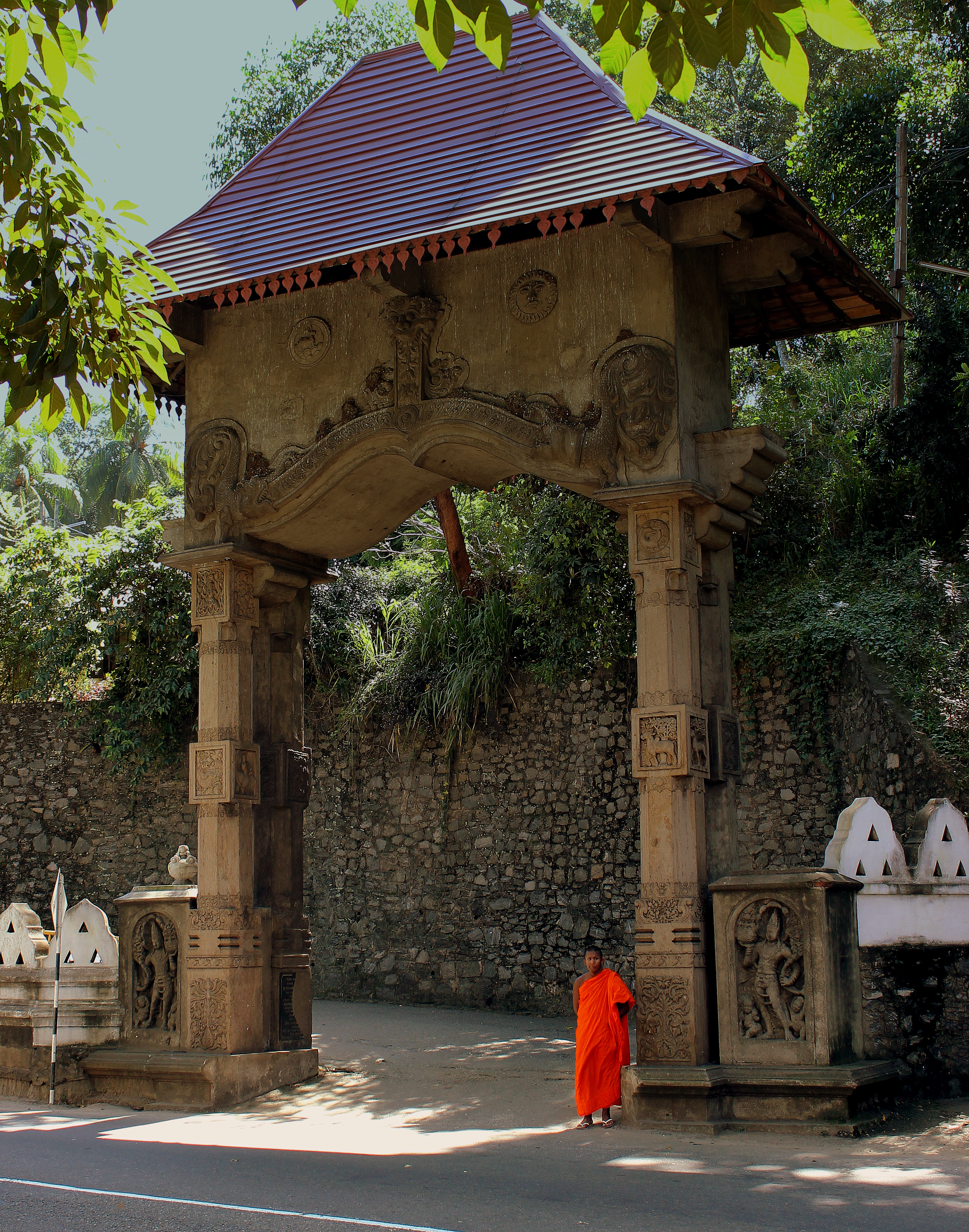 MONASTRY AT KANDY LAKE SRI LANKA JAN 2013